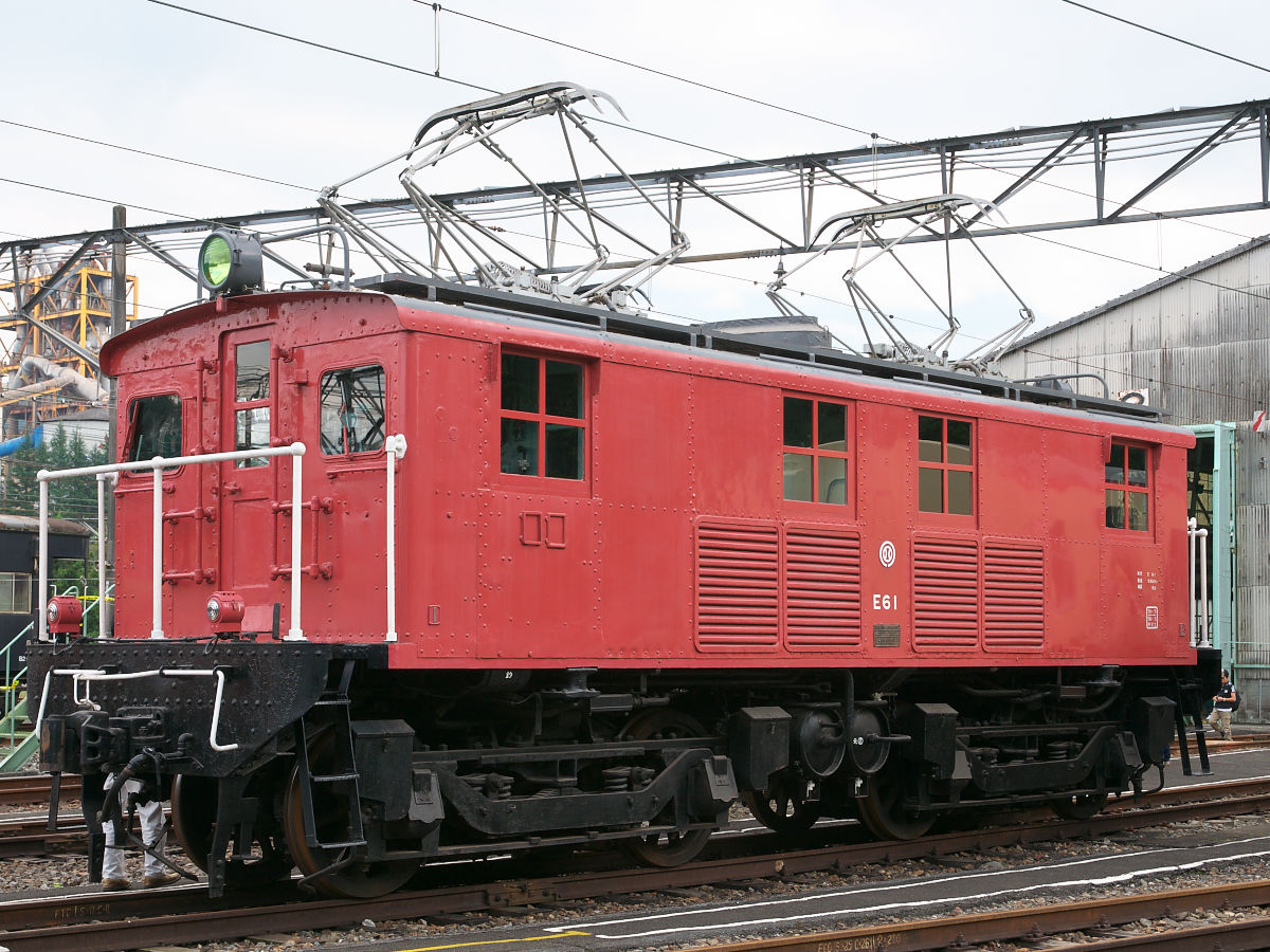 西武鉄道E61形電気機関車（E61）。横瀬車両基地の保存車。